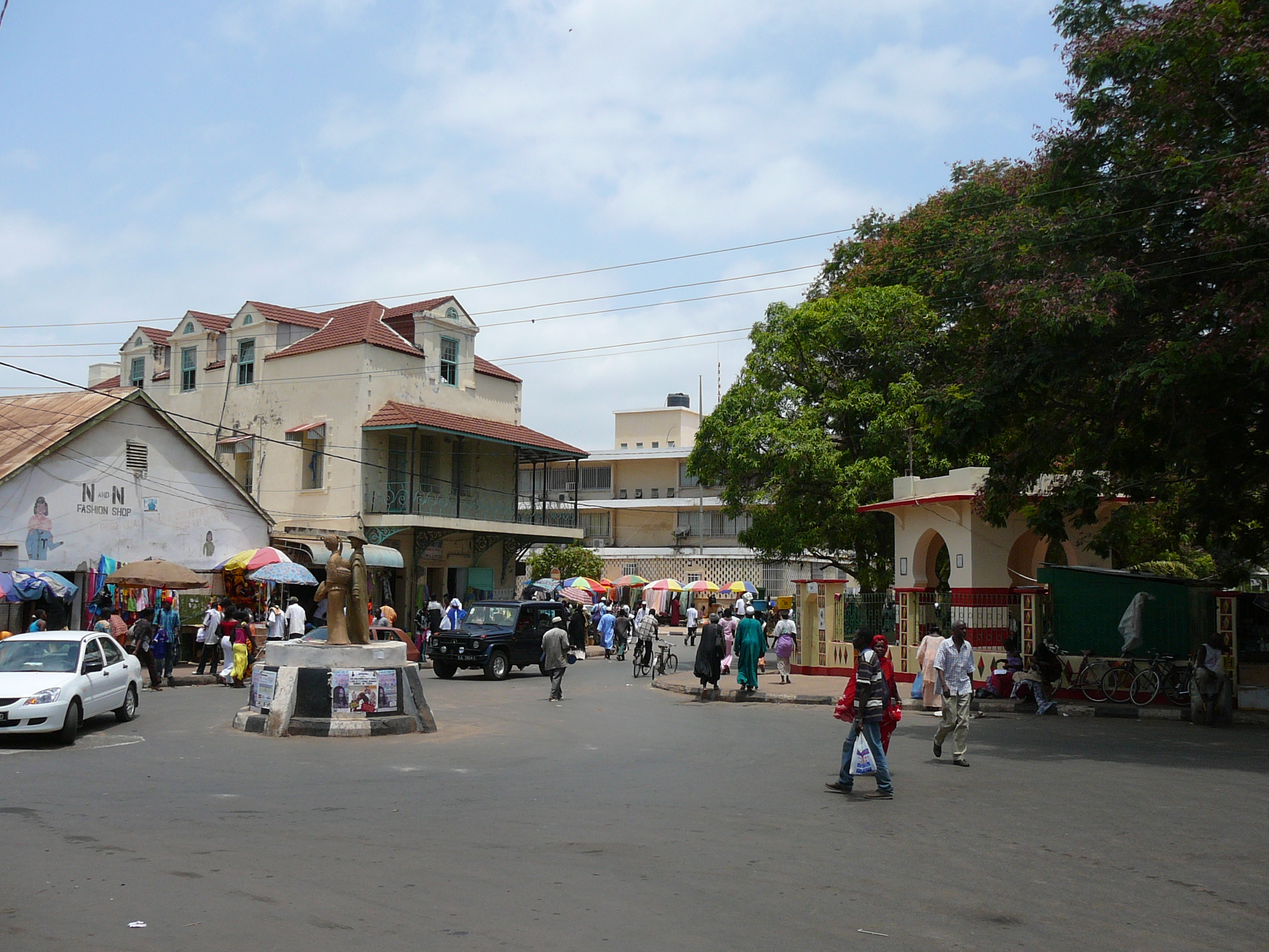 Straße in Banjul